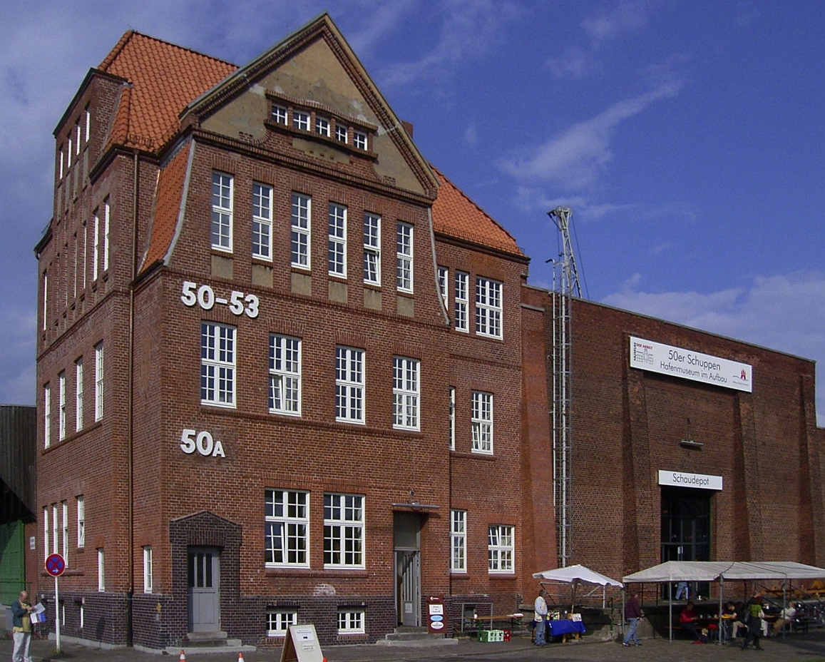 Kopfbau des Schuppens 50 in Kleiner Grasbrook, heute Sitz des Hafenmuseum Hamburg ,der Außenstelle des Museums der Arbeit. Erbaut 1908 bis 1912. Der Kopfbau zeigt Elemente der damaligen Hamburger Reformarchitektur.